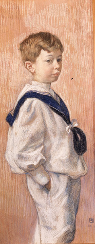 Portrait de Antoine Braun (1893-1980) fils d'Alexandre Braun